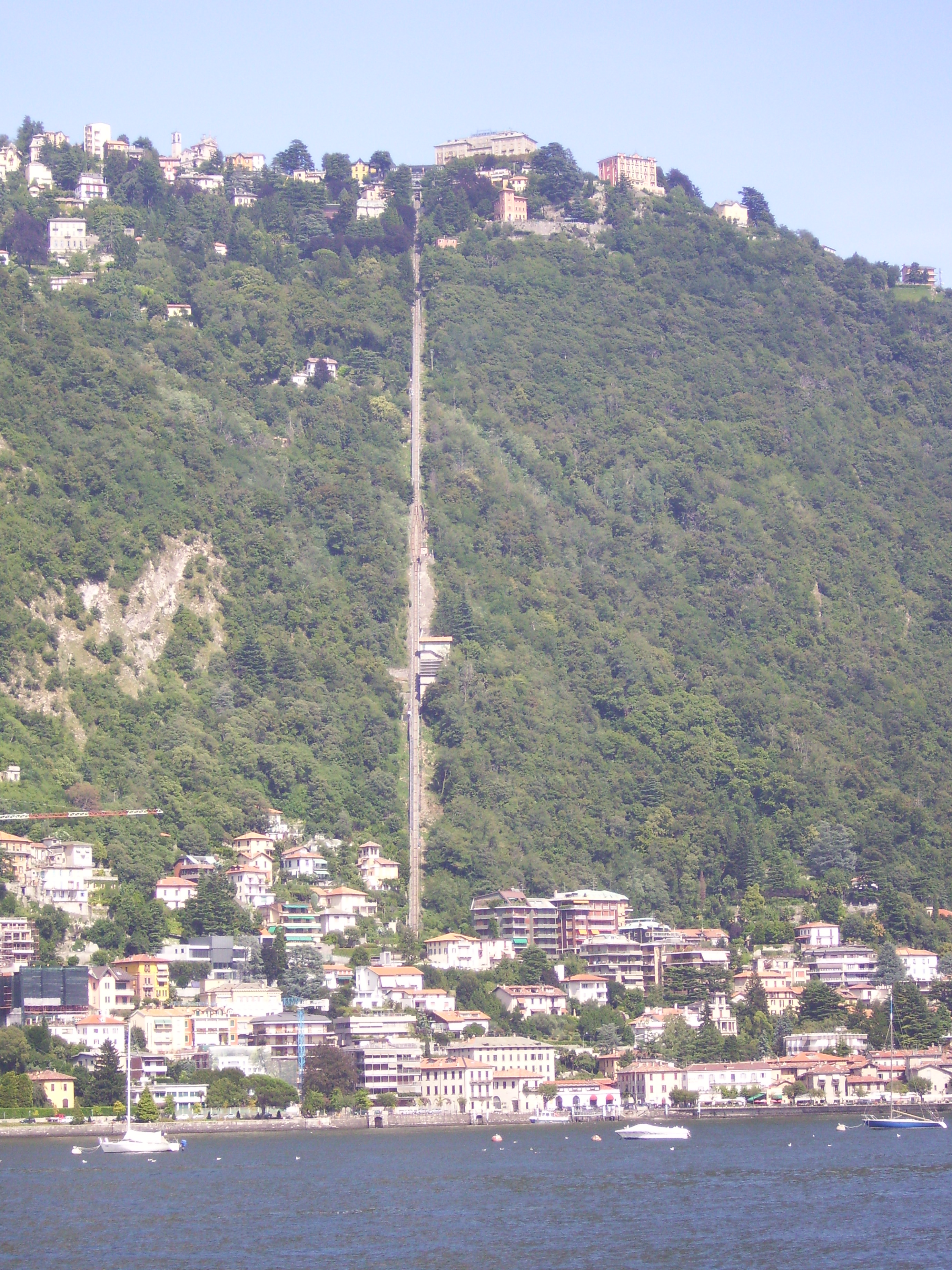 la funicolare da Como a Brunate